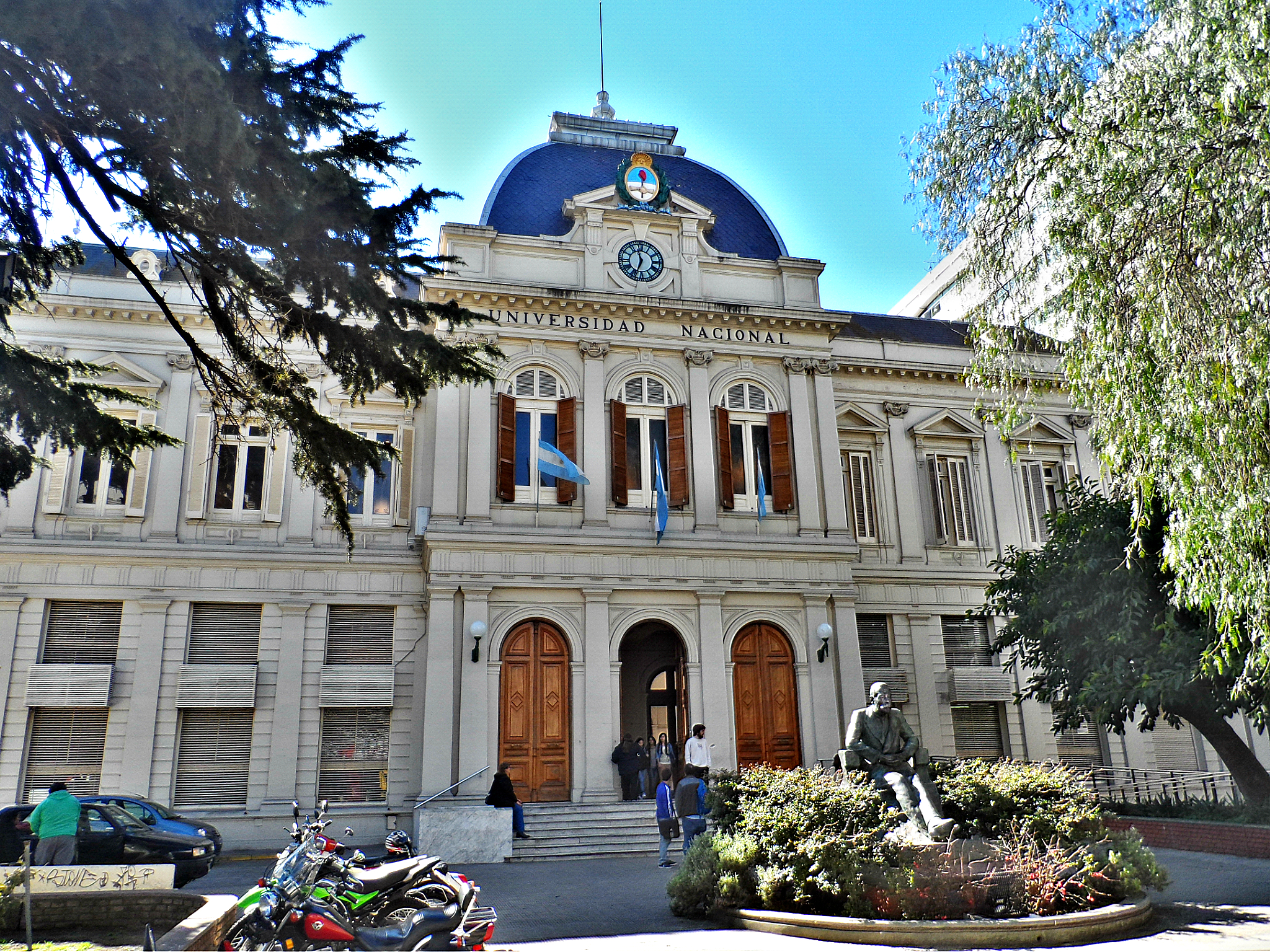 Universidad nacional